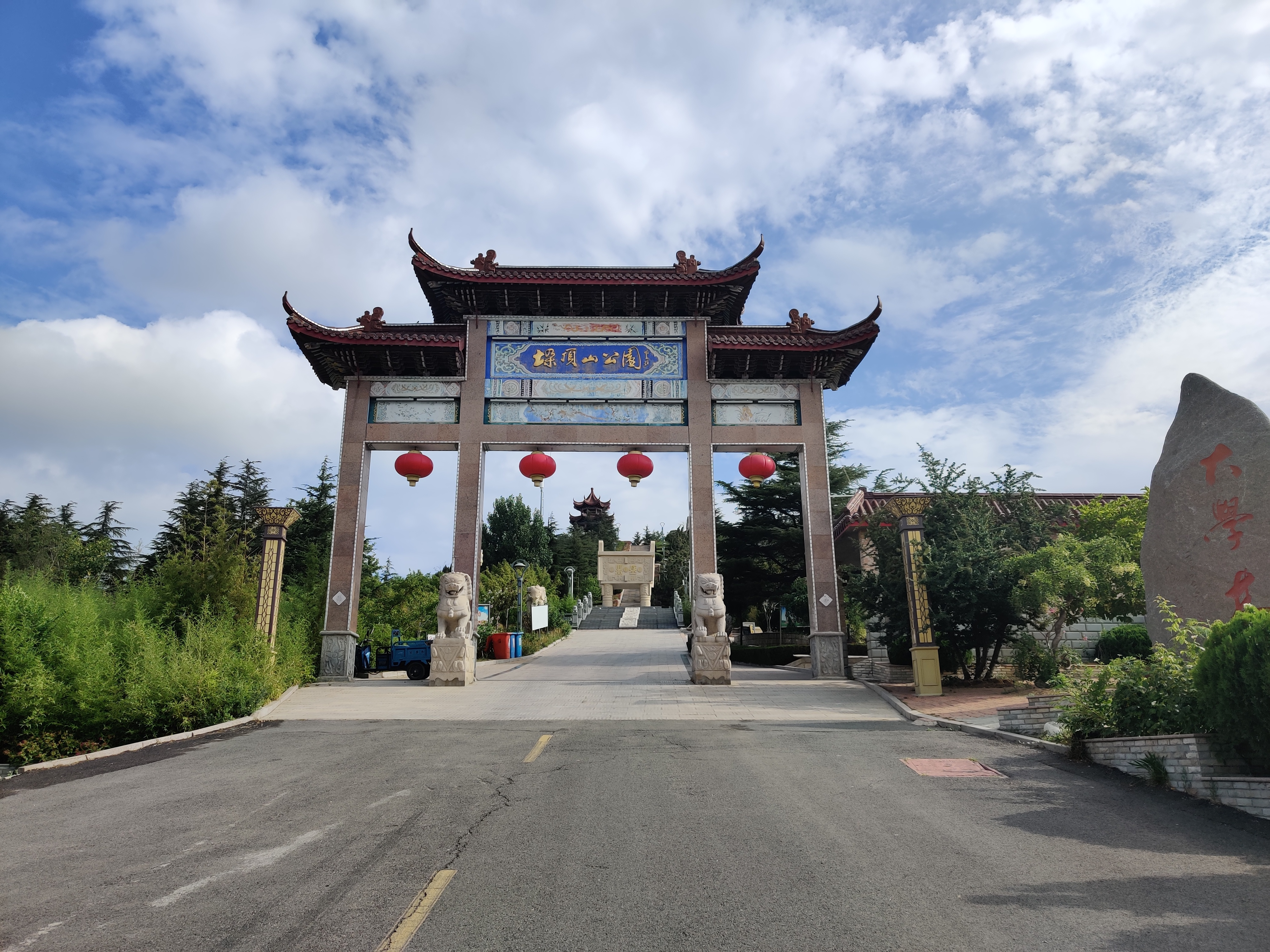 中文（中国大陆）: 威海垛顶山公园门口